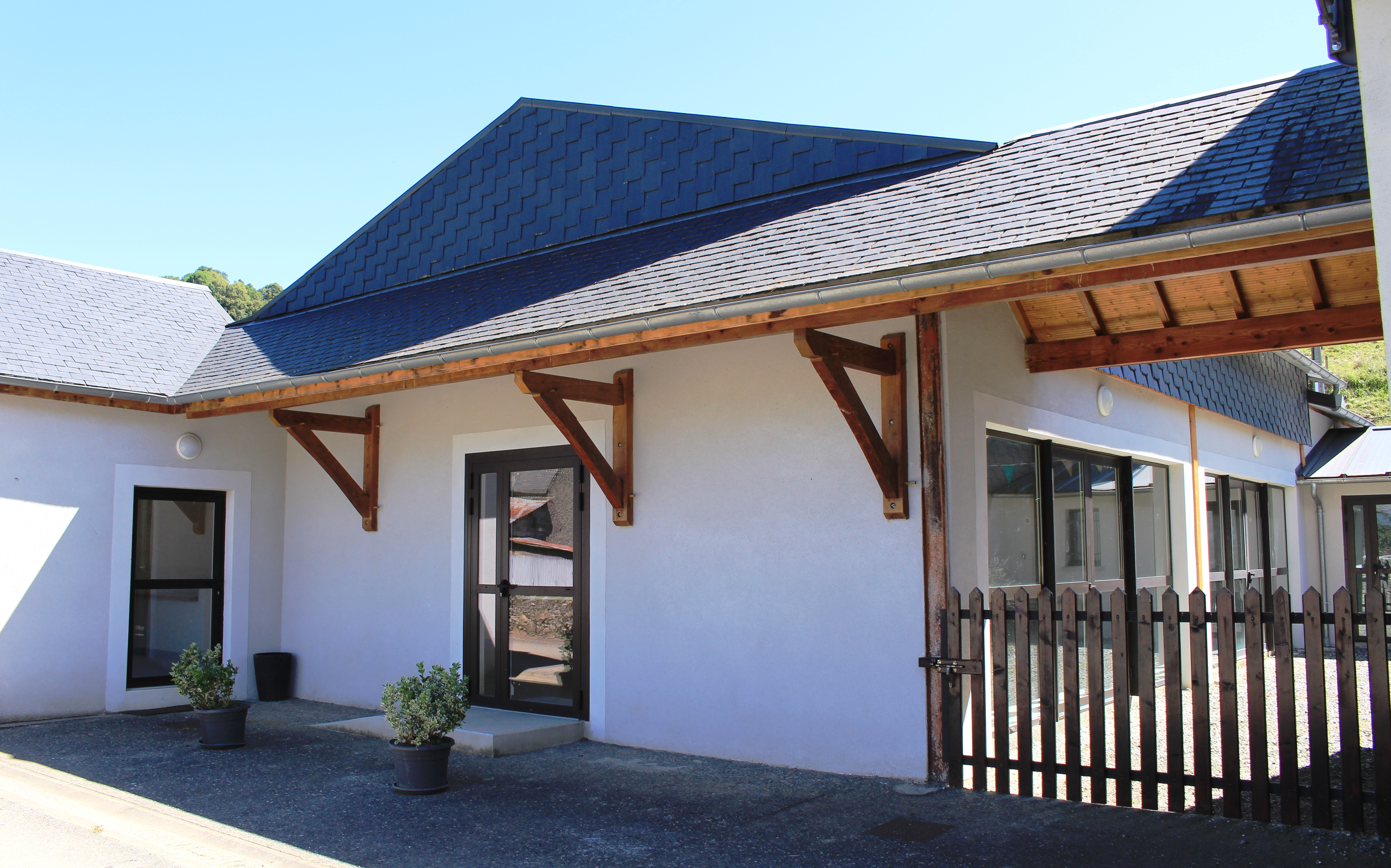 Salle des fêtes de Labastide (Hautes-Pyrénées)